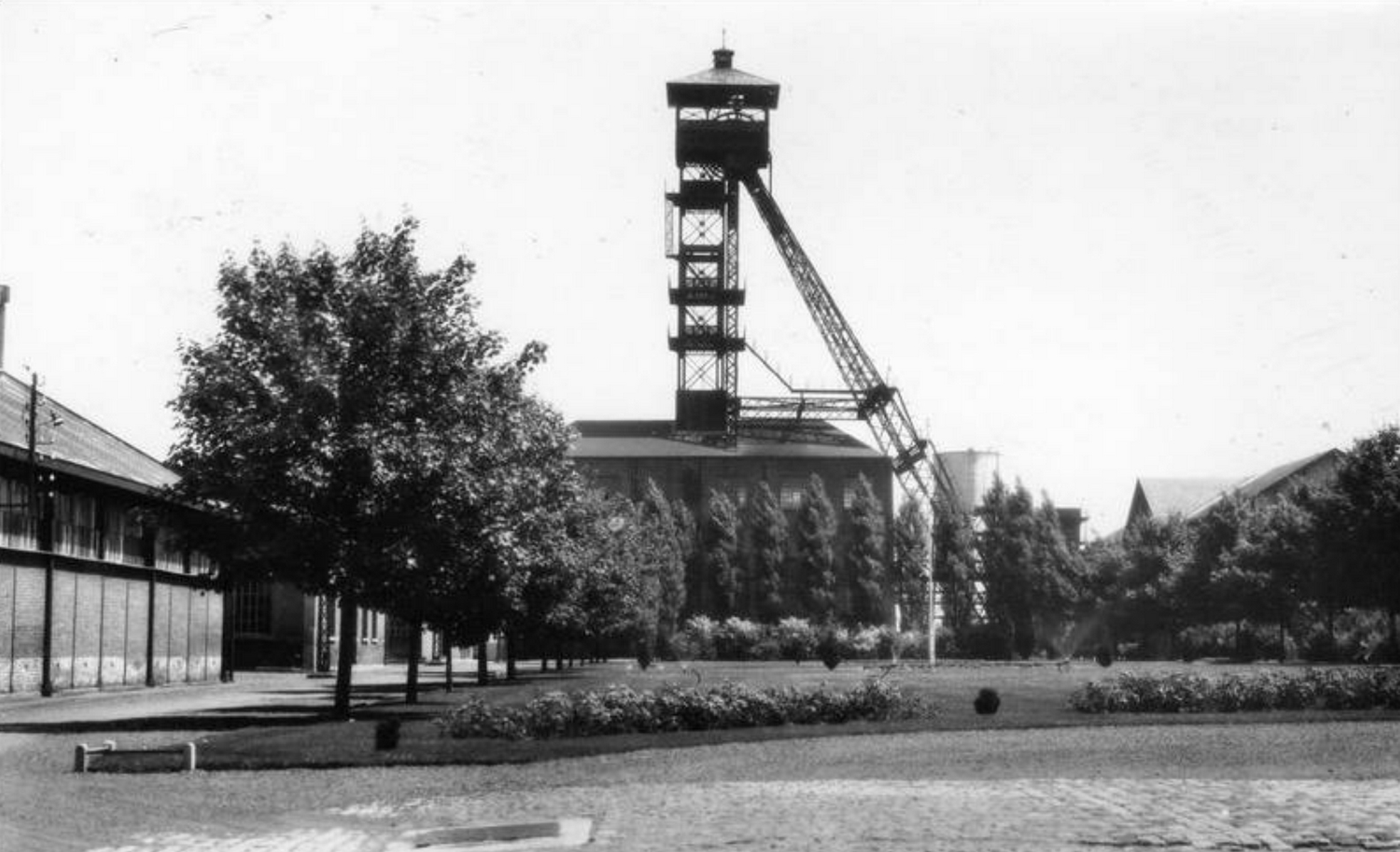 La Fosse n° 23 dite Thellier de Poncheville de la Compagnie des mines de Courrières était un charbonnage constitué d'un seul puits situé à Noyelles-sous-Lens, Pas-de-Calais, Nord-Pas-de-Calais, France.